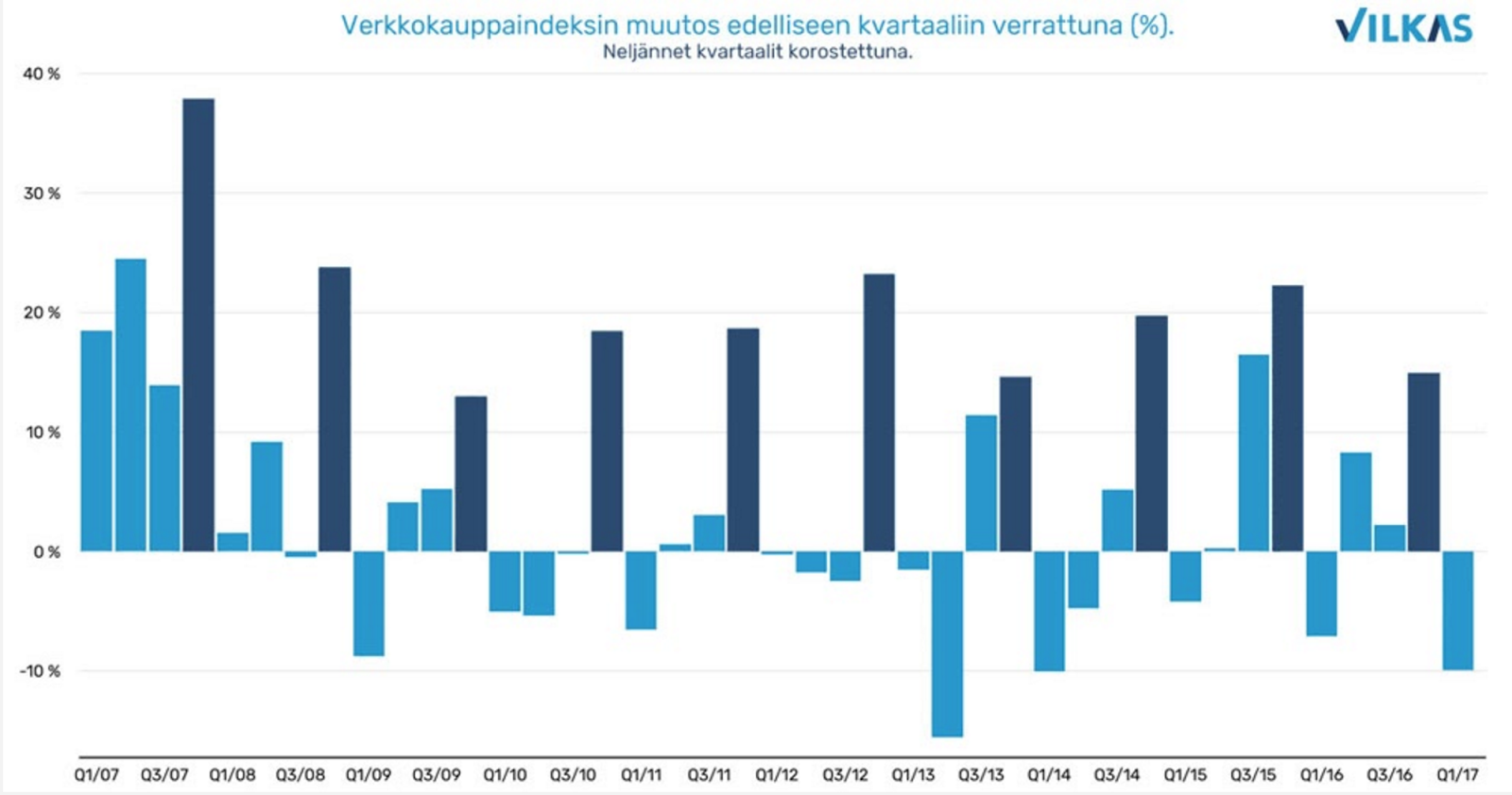 Verkkokaupassa toimii vuosittain sama sykli riippumatta suhdanteesta, kuten yleisestikin kaupan alalla. Verkkokauppojen syklisyys näyttää olevan tosin voimakkaampaa kuin kaupan alalla keskimäärin. Verkkokaupan alkuvuosi alkaa hitaasti saavuttaen loppuvuodesta vuoden huipun.